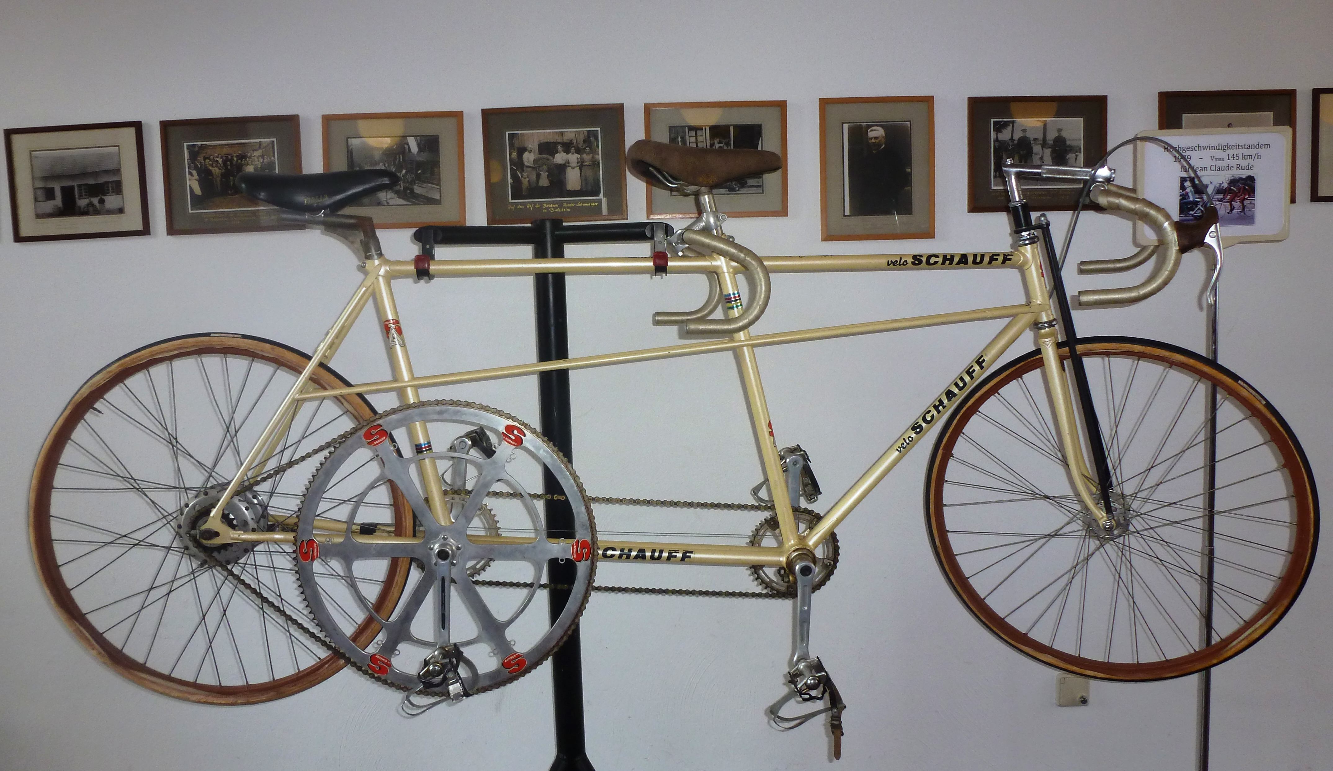 Renntandem der Firma Schauff des Rennfahrers Jean Claude Rude aus dem Jahr 1979, Ausstellung auf der Deutschen Rennrad-Börse 2011 in Nettesheim-Butzheim